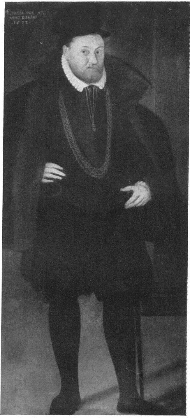 unbekannter Künstler: Heinrich IV. zu Castell